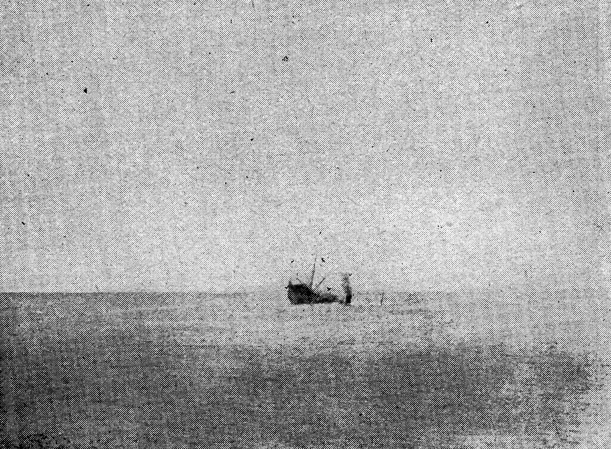 Der australische Dampfer MATUNGA, eine Prise des deutschen Hilfskreuzers SMS WOLF, sinkt am 26. August 1917 vor der Insel Waigeo nördlich Neuguineas, ausgelöst durch Sprengpatronen.